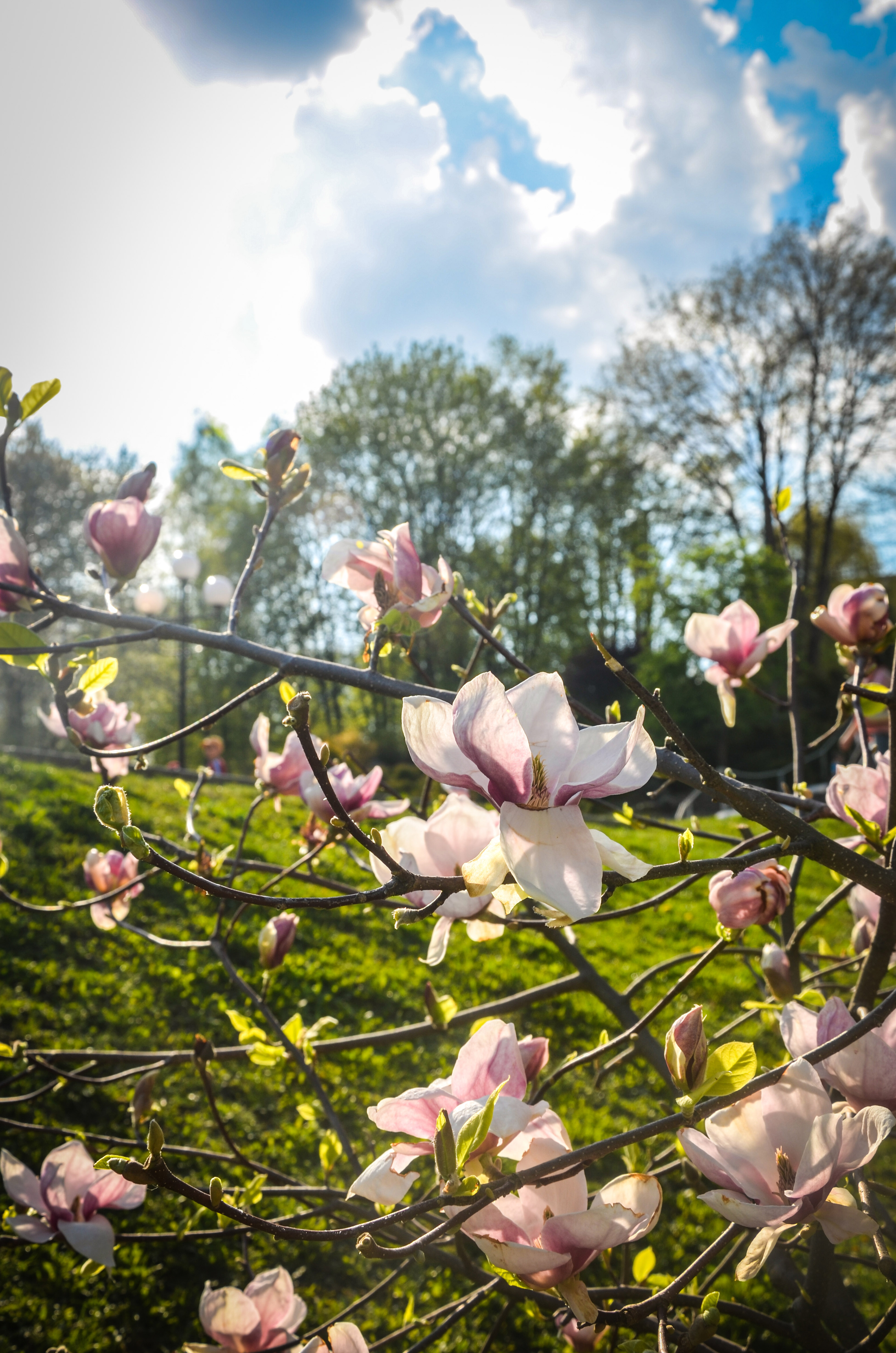 Частину ботанічного саду, який розташовується по вулиці Інститутській у місті Хмельницькому, на території Хмельницького національного університету.